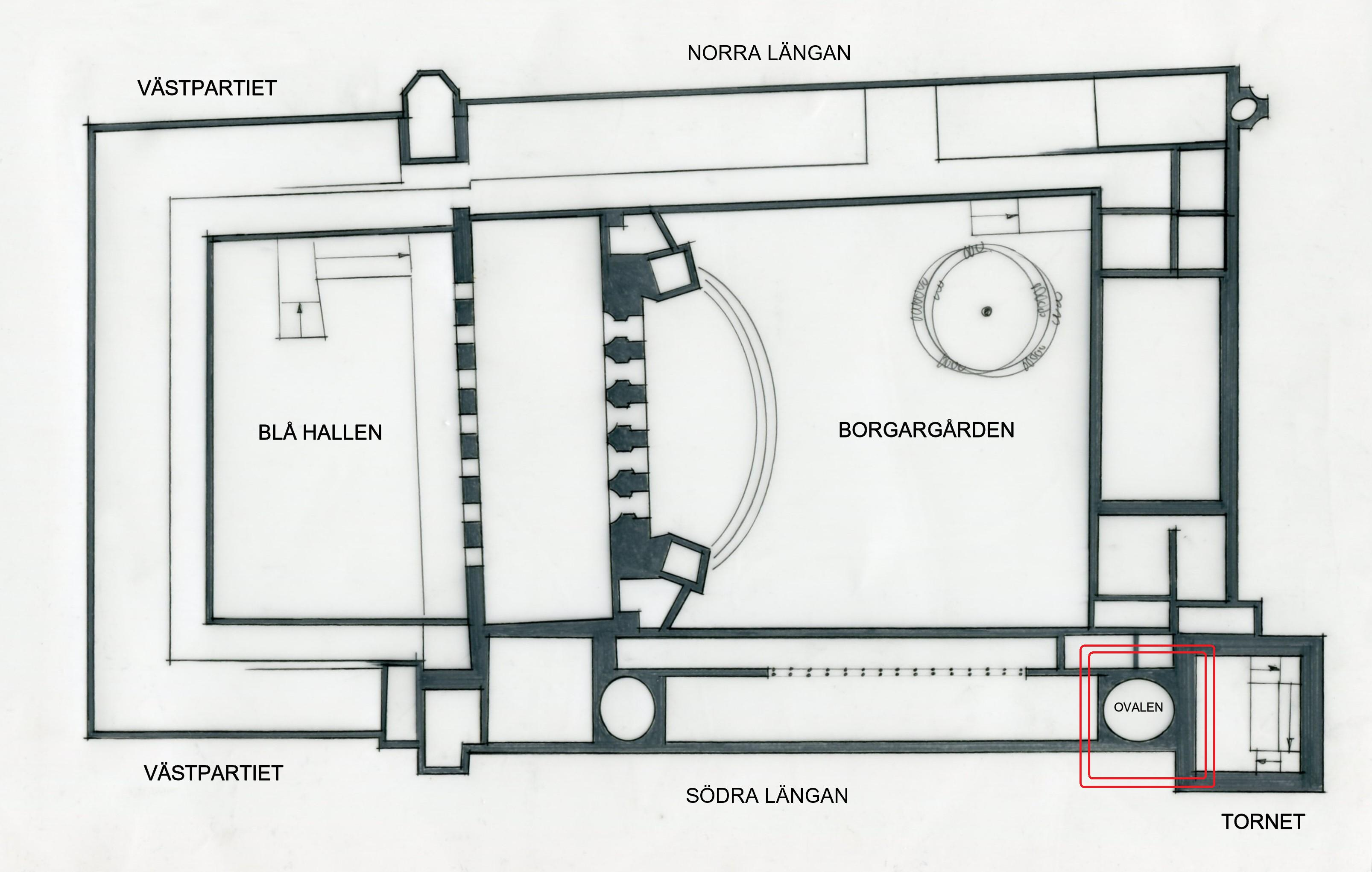 Stockholms stadshus översiktsplan våning 1 trappa, De hundrades valv